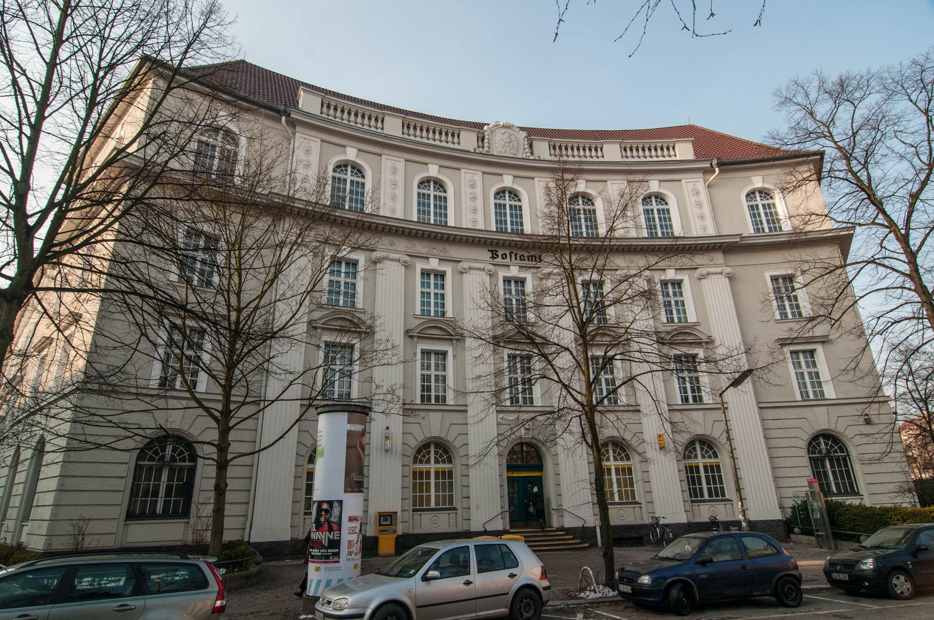 Postamt 240 Handjerystr